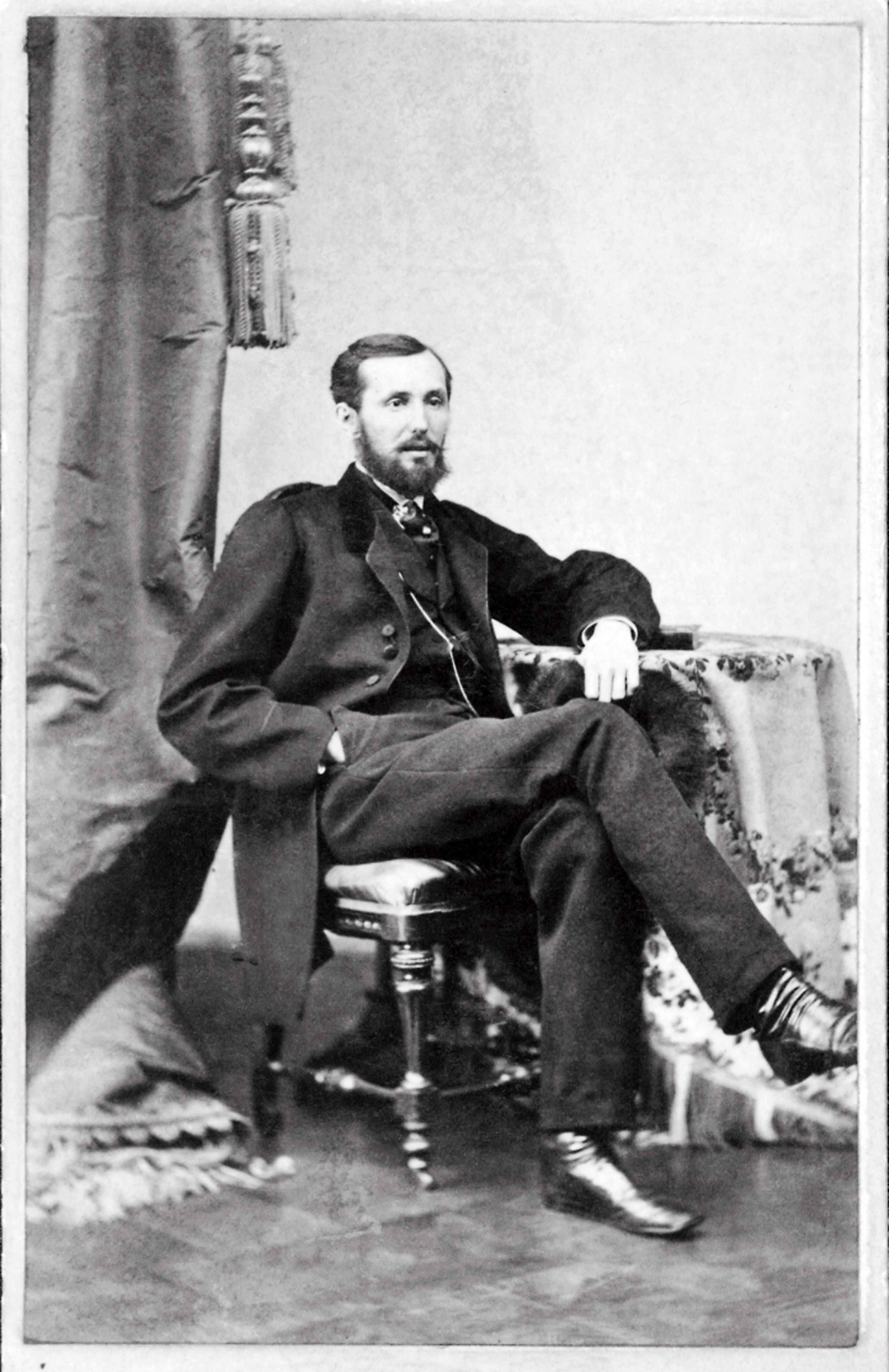 Каминский, Александр Степанович